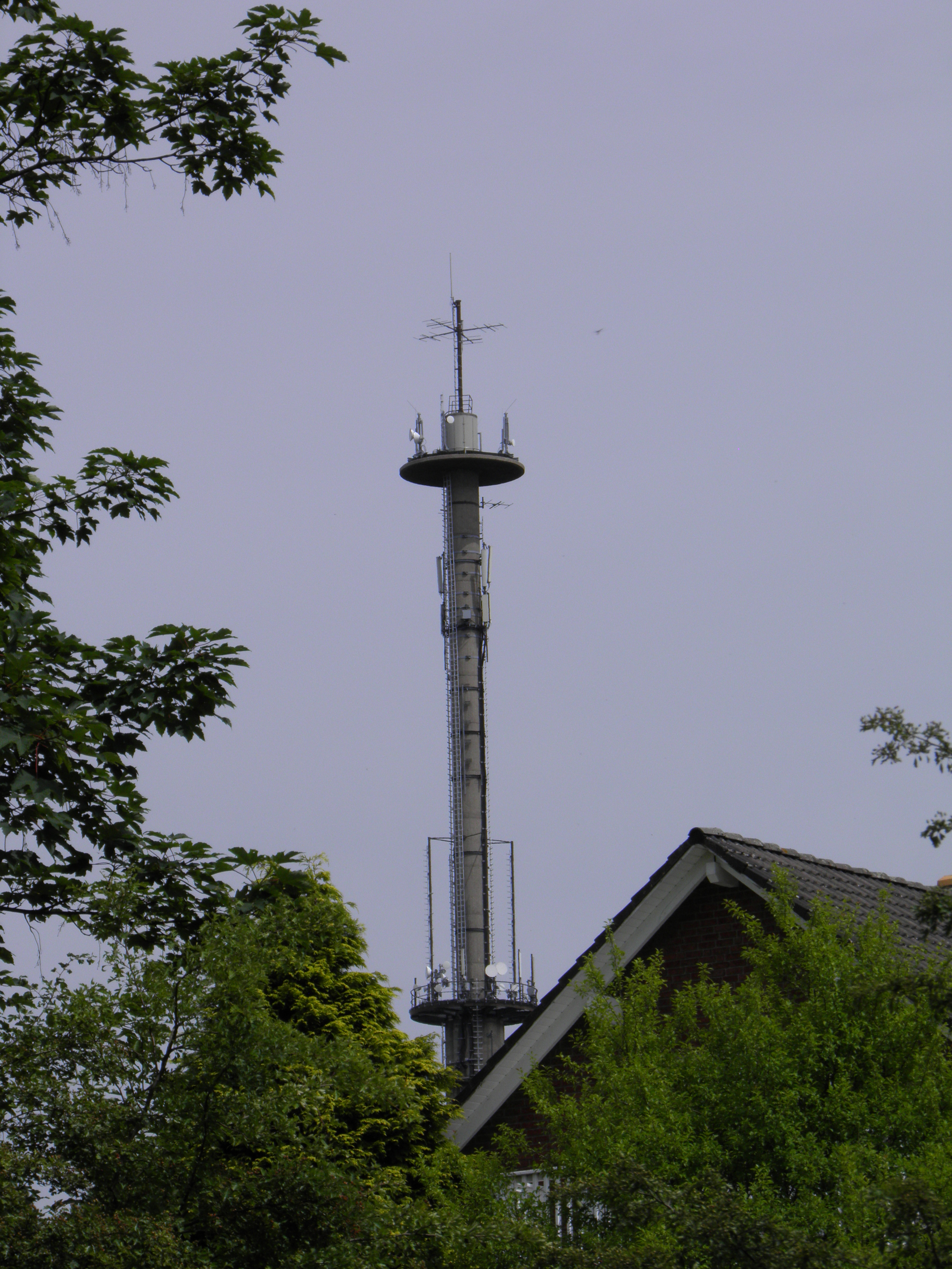 Hohenhagen Mast